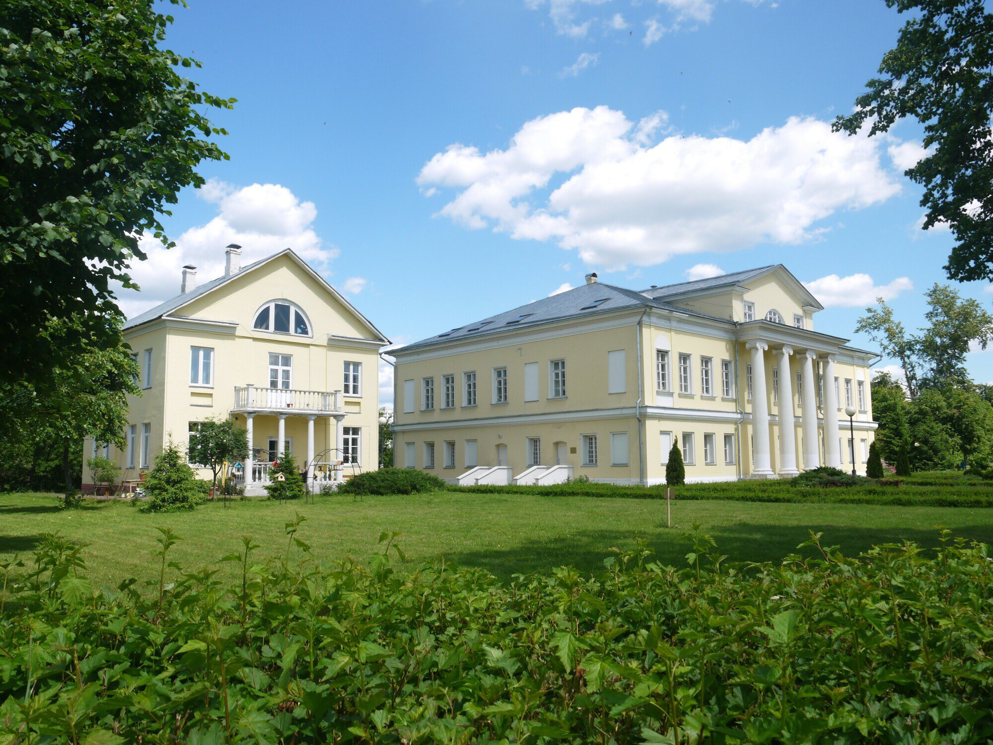 Усадьба Свиблово: Свиблово, Северо-Восточный округ, Москва